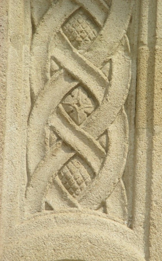 Flechtmuster mit Flieder- und Ananasornamenten am alten Rathaus in Luxemburg Stadt am Krautmarkt (Palais Grand-ducal)